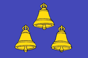 Флаг города Далматово (Курганская область) (2006 г.)